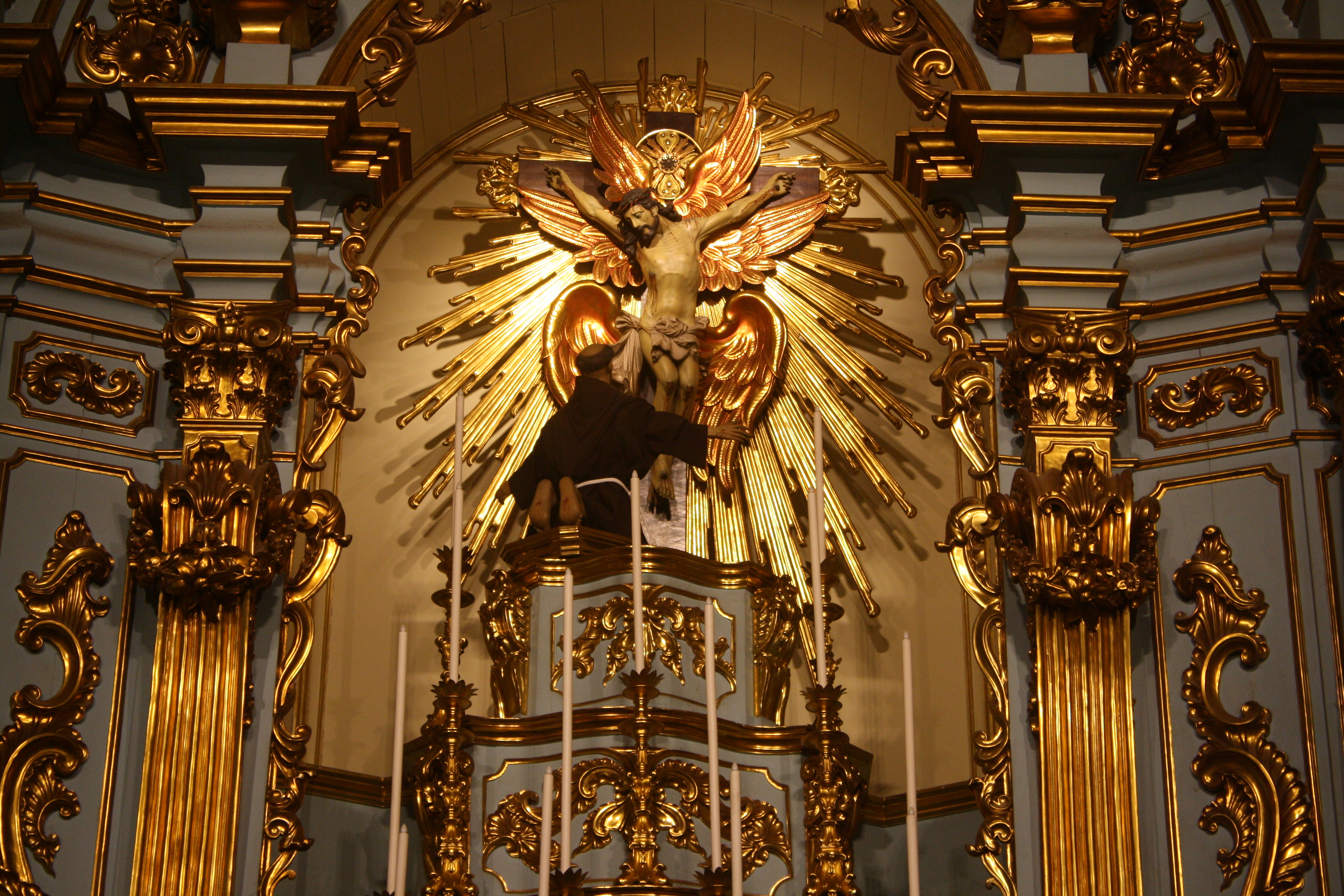 Detalhe do altar: São Francisco recebendo as Chagas, na Igreja das Chagas do Seráfico Pai São Francisco, em São Paulo (SP), Brasil